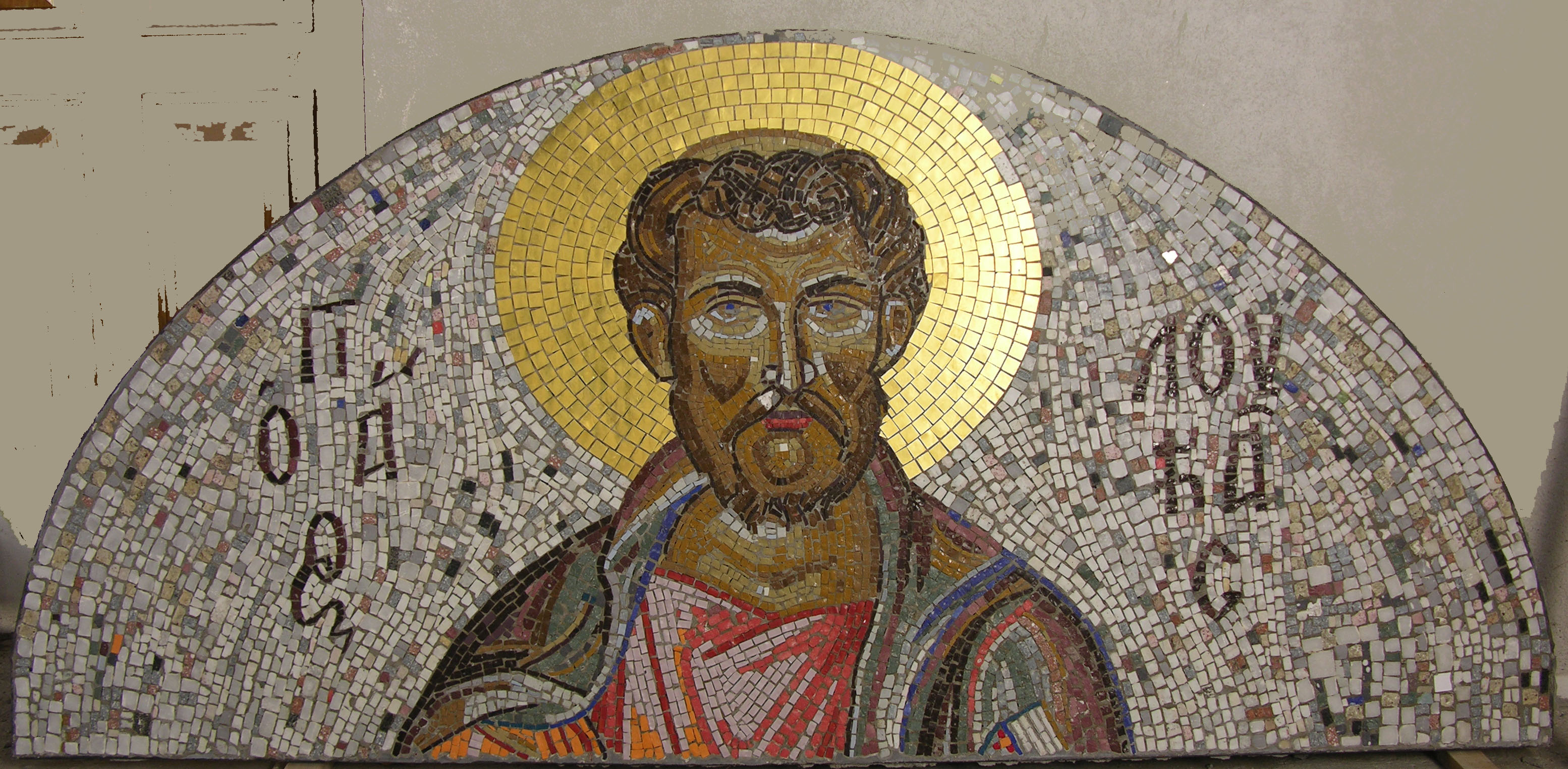 Srpski (latinica): Ljubiša Brković, Sveti Luka, mozaik